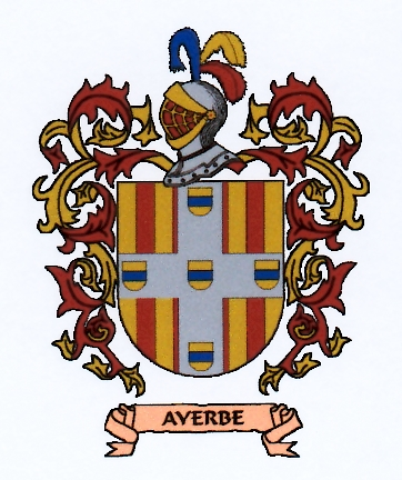 Escudo del infante Don Pedro de Ayerbe, hijo bastardo, y más tarde legitimado, de Jaime I el Conquistador, rey de Aragón, y de su tercera esposa, la reina Doña Teresa Gil de Vidaure.